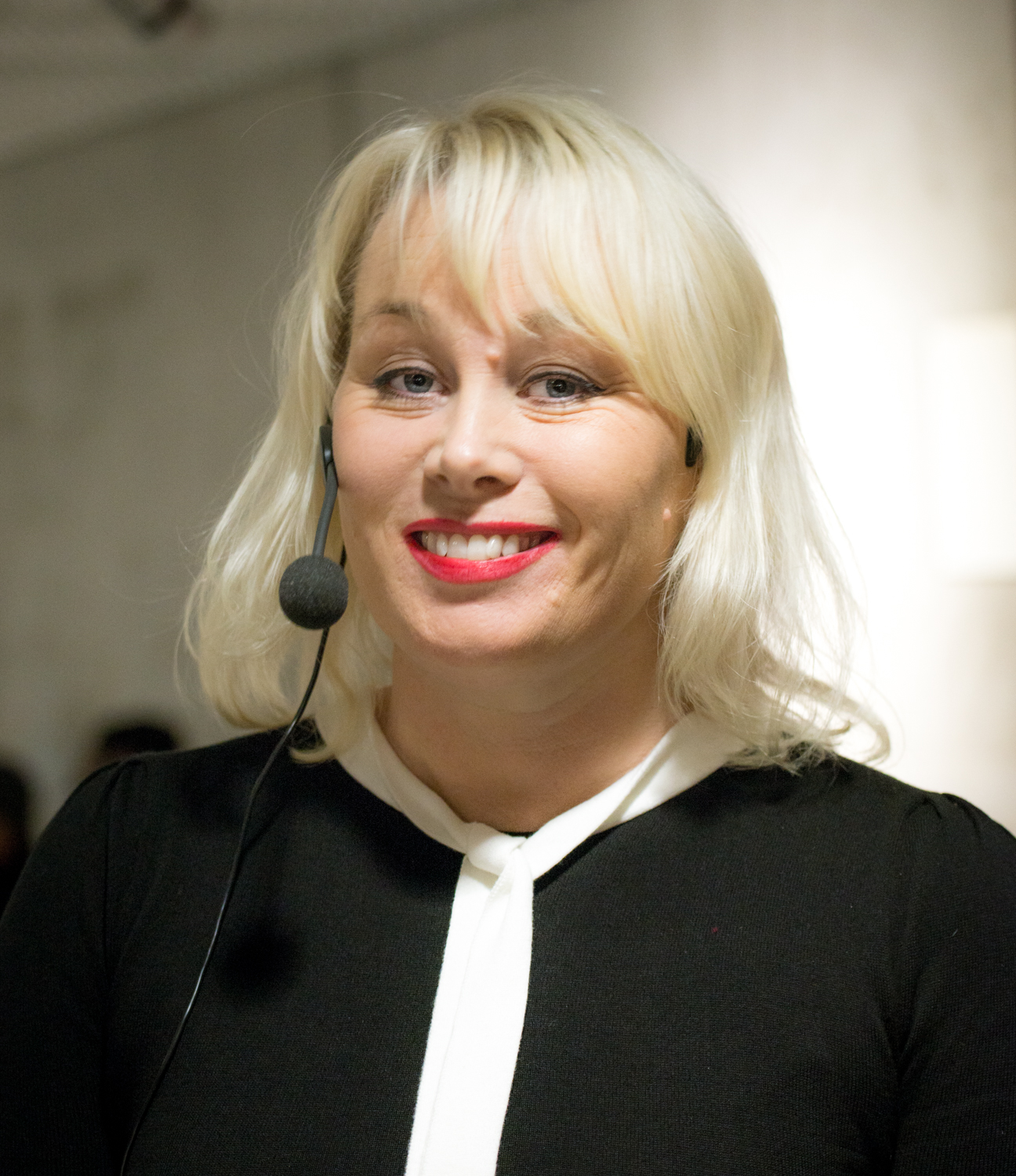 Ann Heberlein på Akademibokhandeln City i Stockholm den 20 oktober 2016.